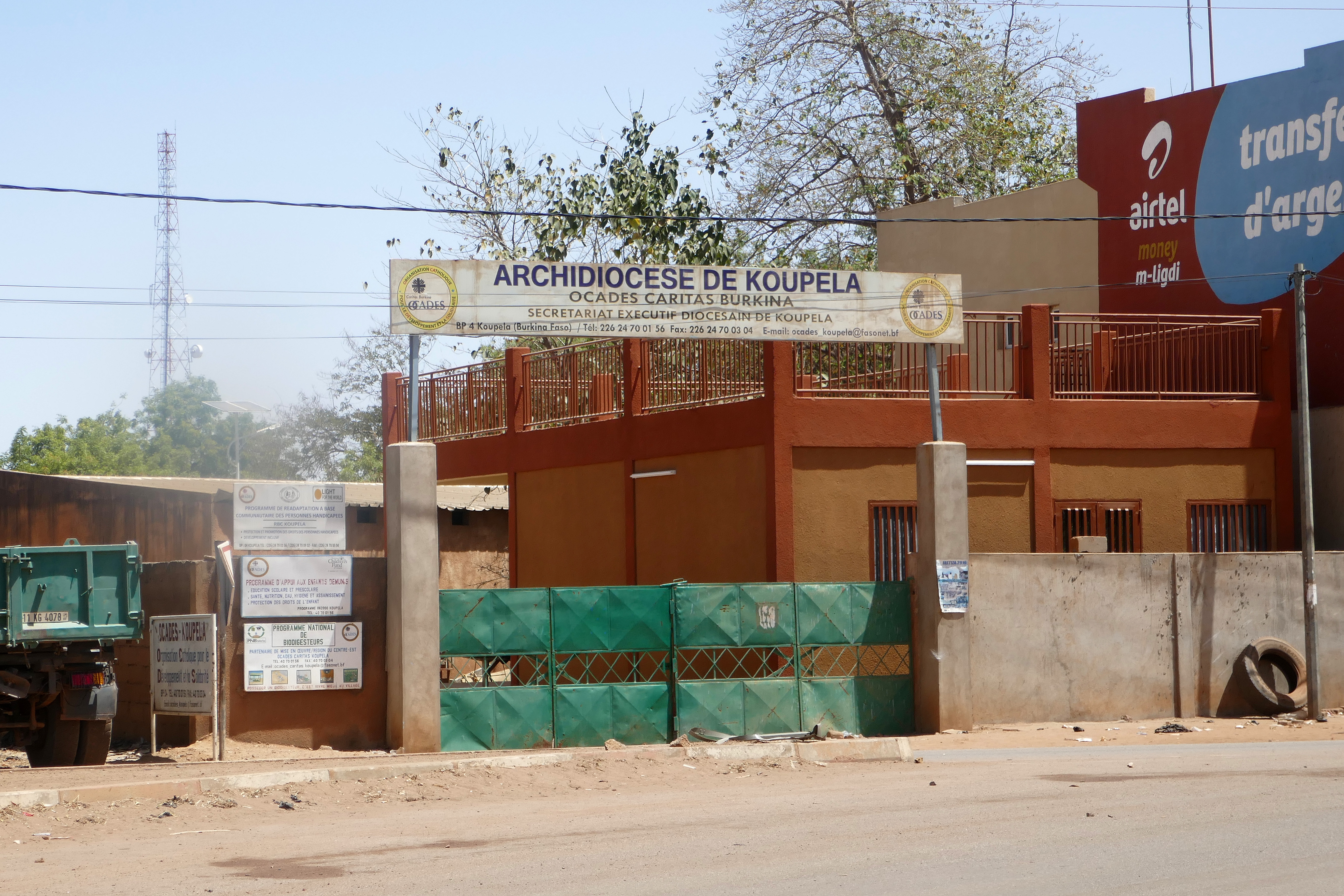 Archidiocèse de Koupéla (Burkina Faso).